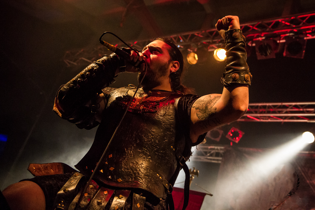 Ex Deo - Paganfest 2013 Wuerzburg - 01-03-2013